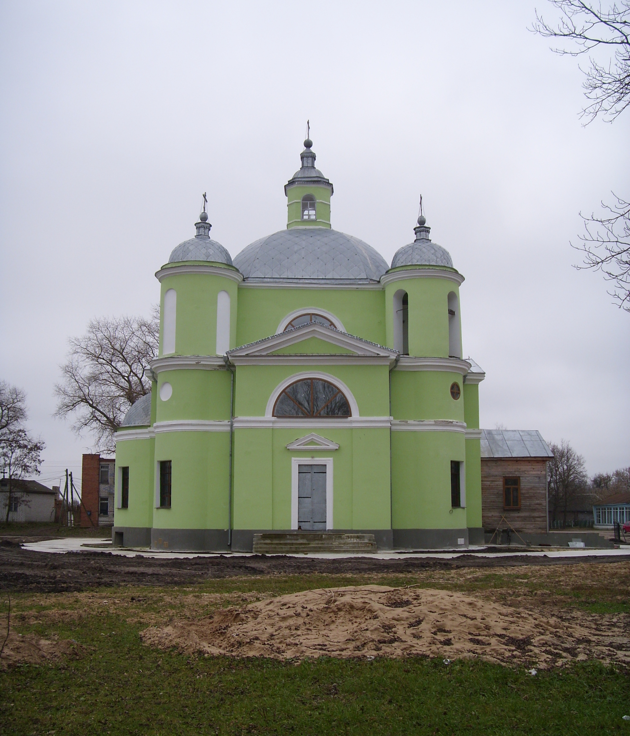 Троицкая церковь (Брянская область, Стародуб, село гринево)